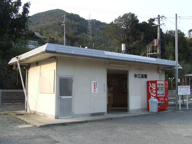 JR西日本芸備線中三田駅の駅舎写真